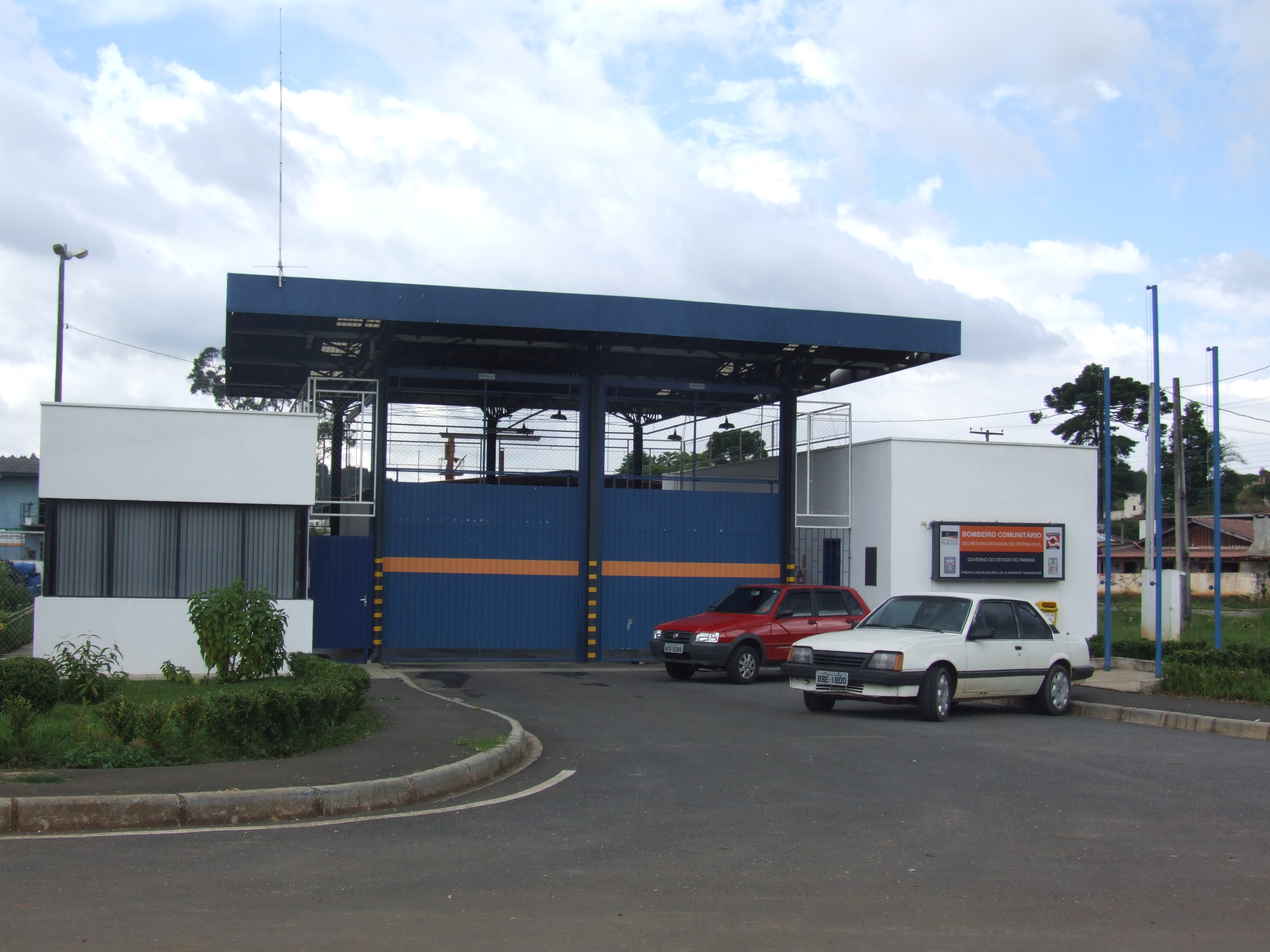 Corpo de Bombeiros de Almirante Tamandaré (PR).